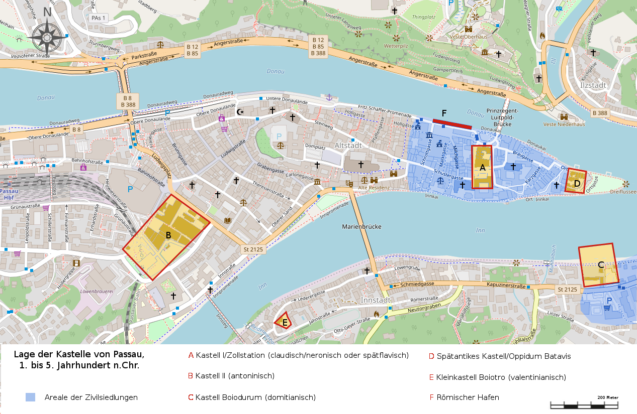 Lageskizze der Kastelle von Passau (D), 1. bis 5. Jahrhundert n.Chr.